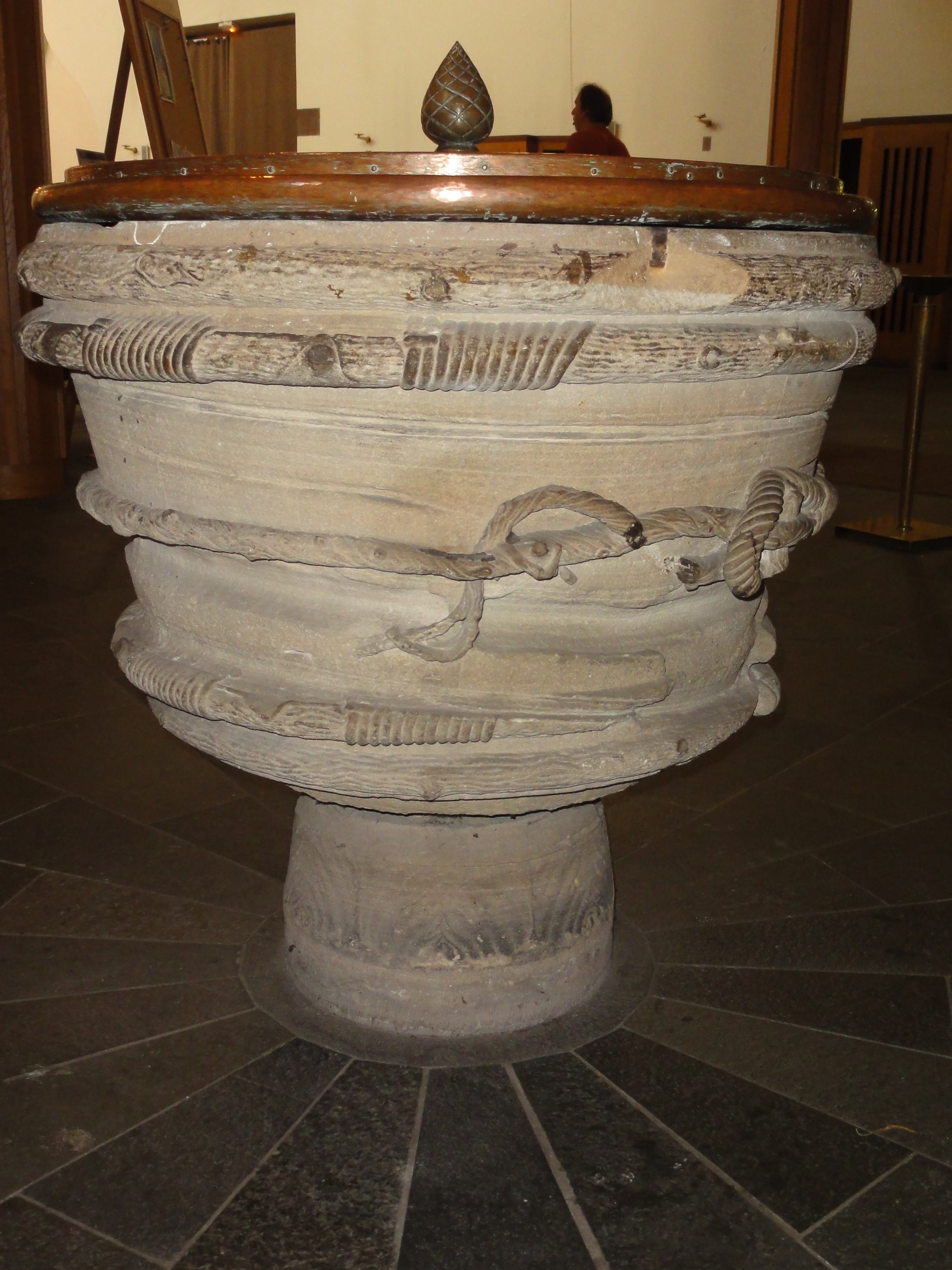 Alsace, Bas-Rhin, Église Saint-Jean de Strasbourg (PA00085027). Fonts baptismaux (XVe).